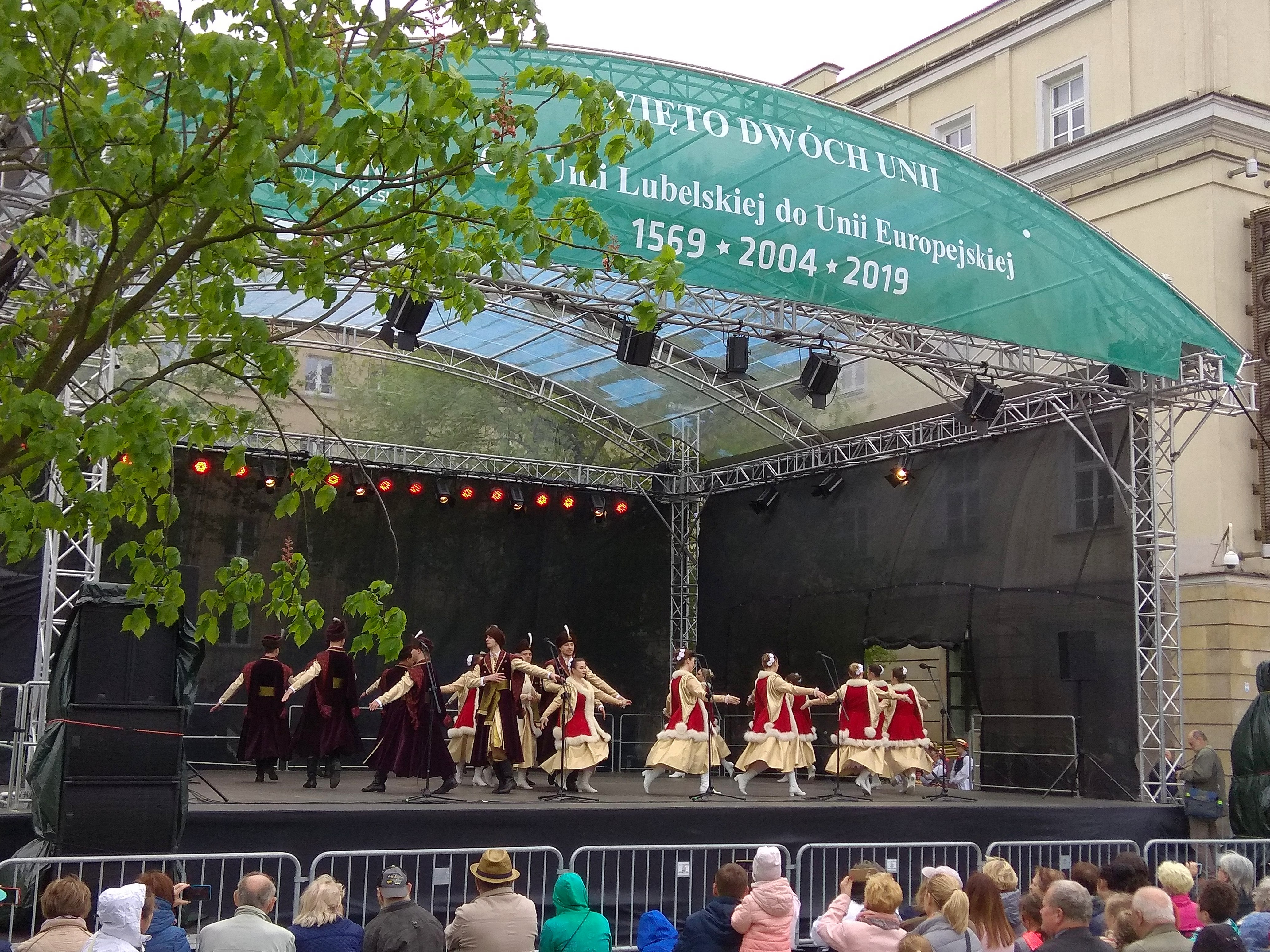 Występ Zespołu Pieśni i Tańca „Lublin” im. Wandy Kaniorowej na Święcie dwóch Unii w Lublinie